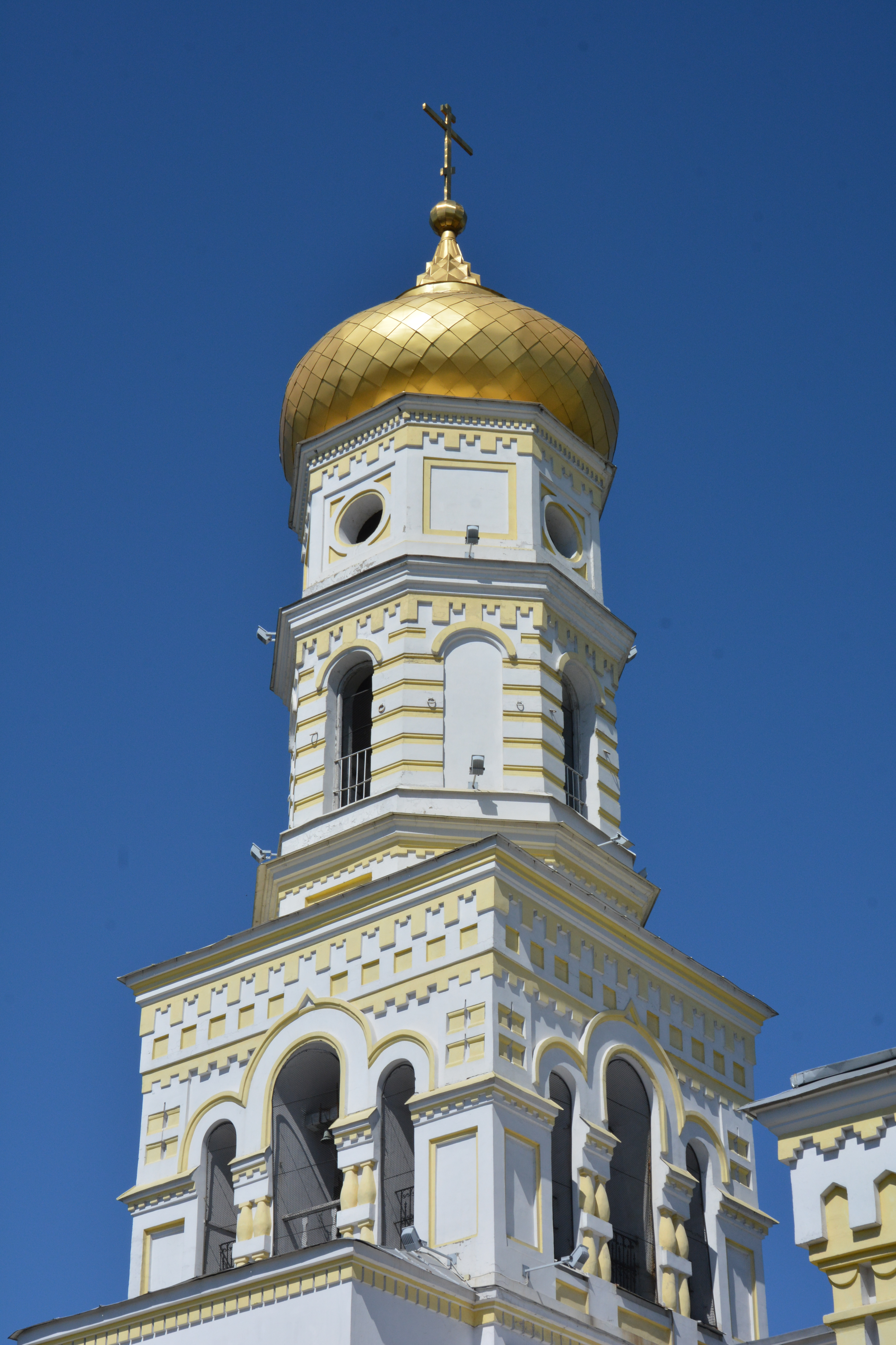 Троїцька церква, Собор Нерукотворного Спаса, Павлоград, пров. Голубицького